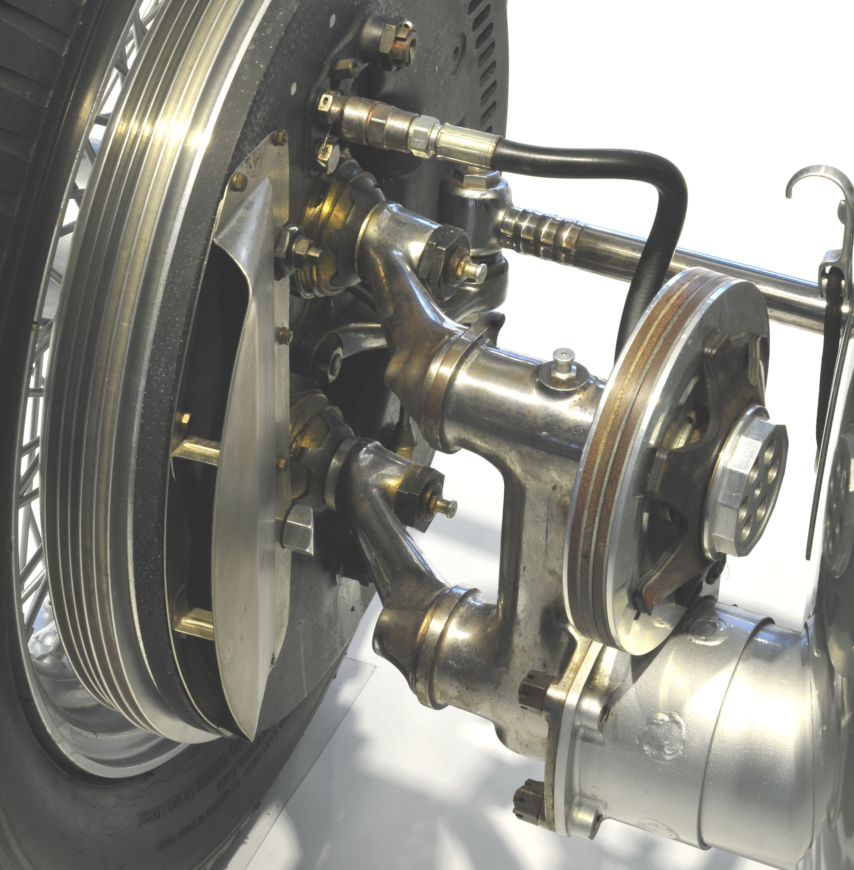 Vorderrad-Aufhängung (Kurbellenkerachse) an einem AUTO-UNION-Rennwagen